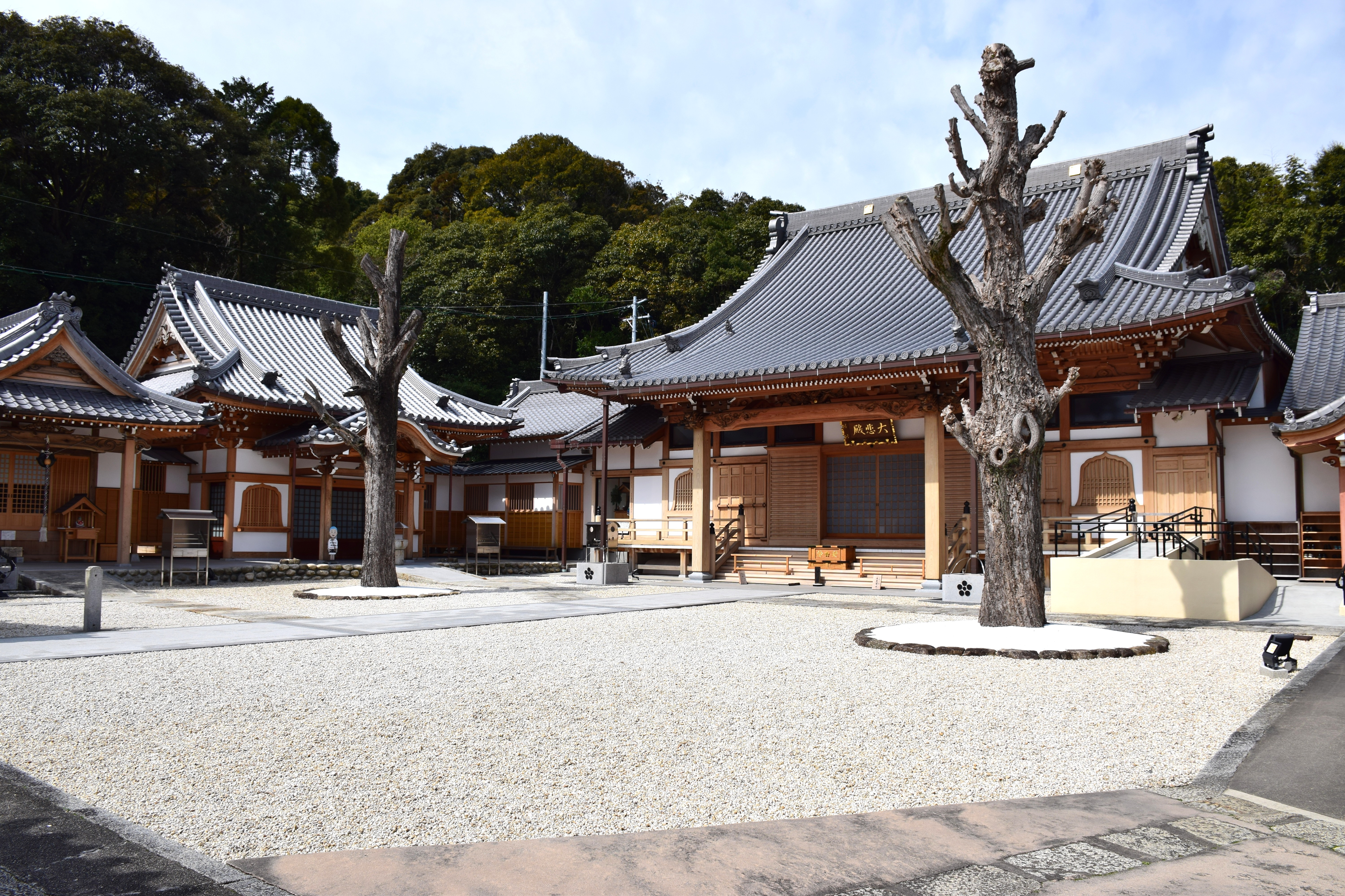 洞雲院本堂・境内